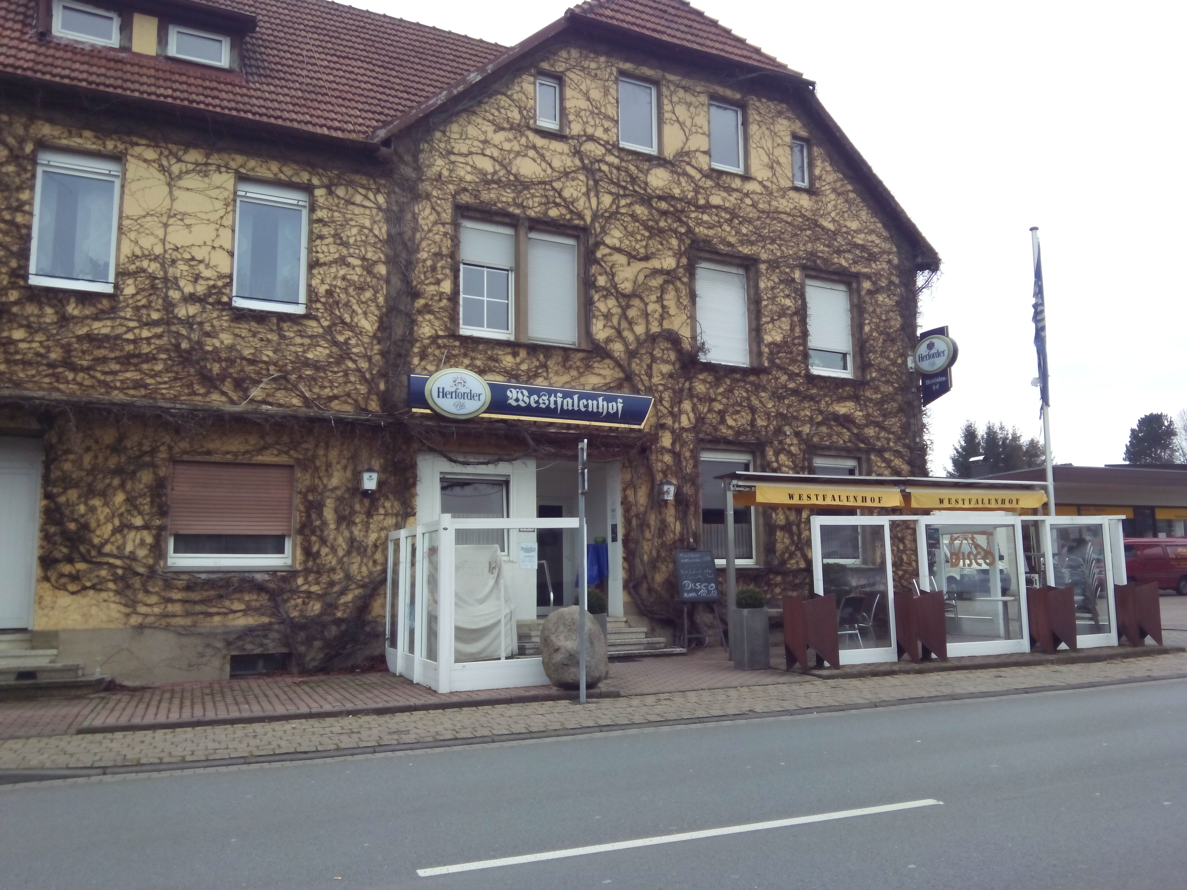 Die Dorfkneipe von Westerengerː Der Westfalenhof